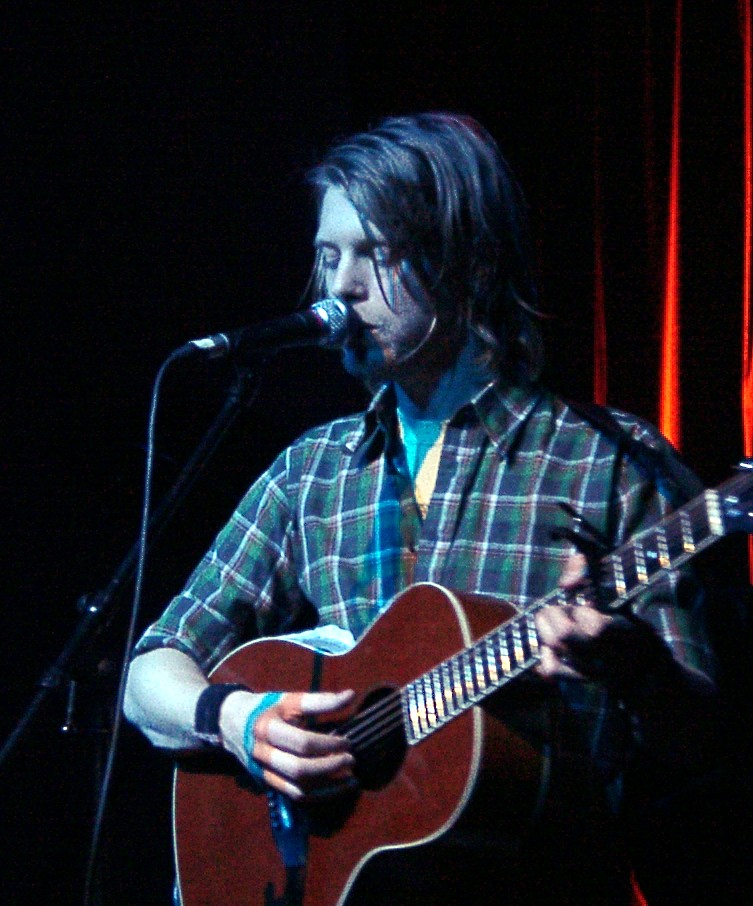 Kristofer Åström in Berlin on January 23, 2007